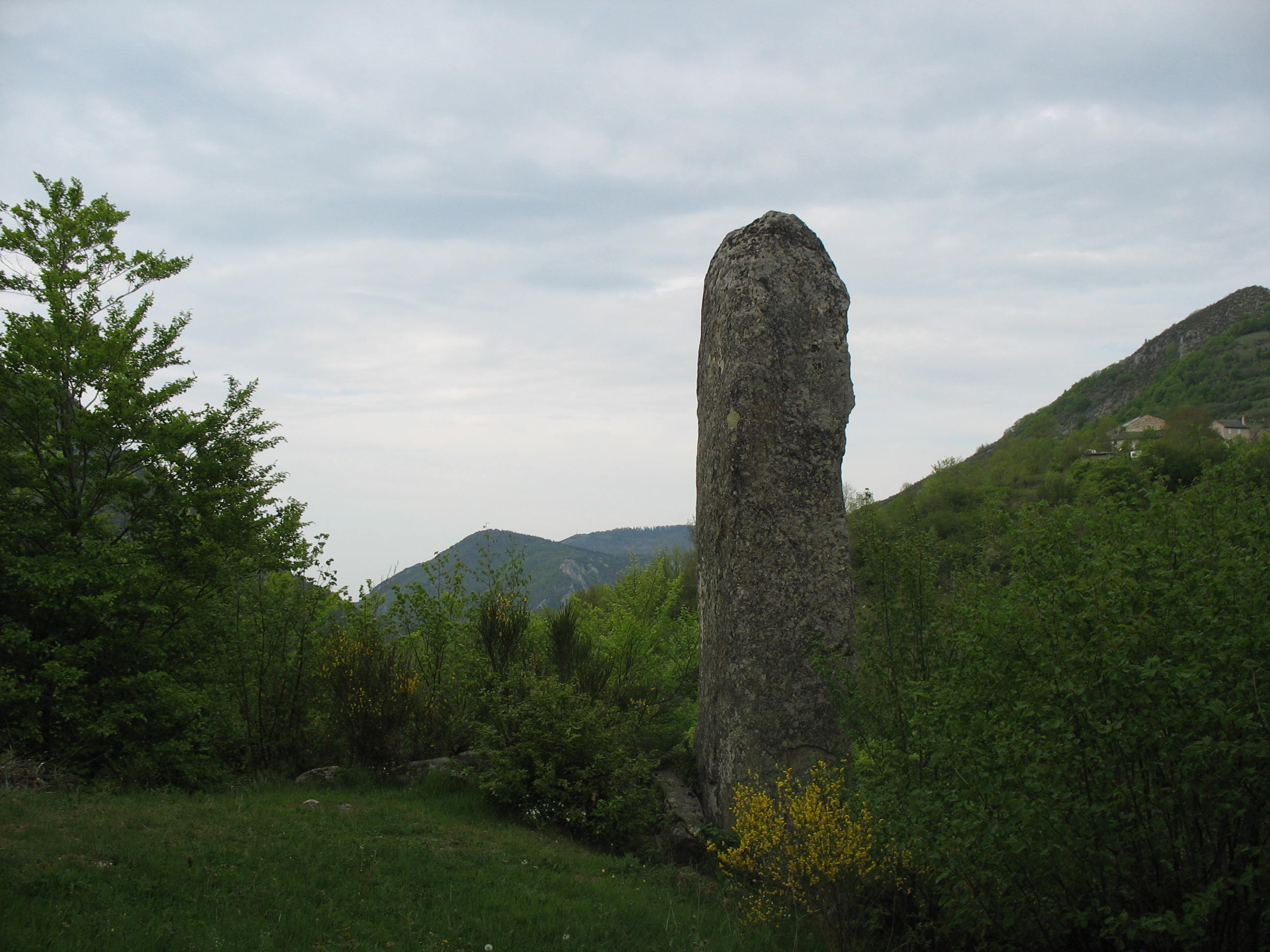 menhir prés du col de Jau dans l'Aude, France